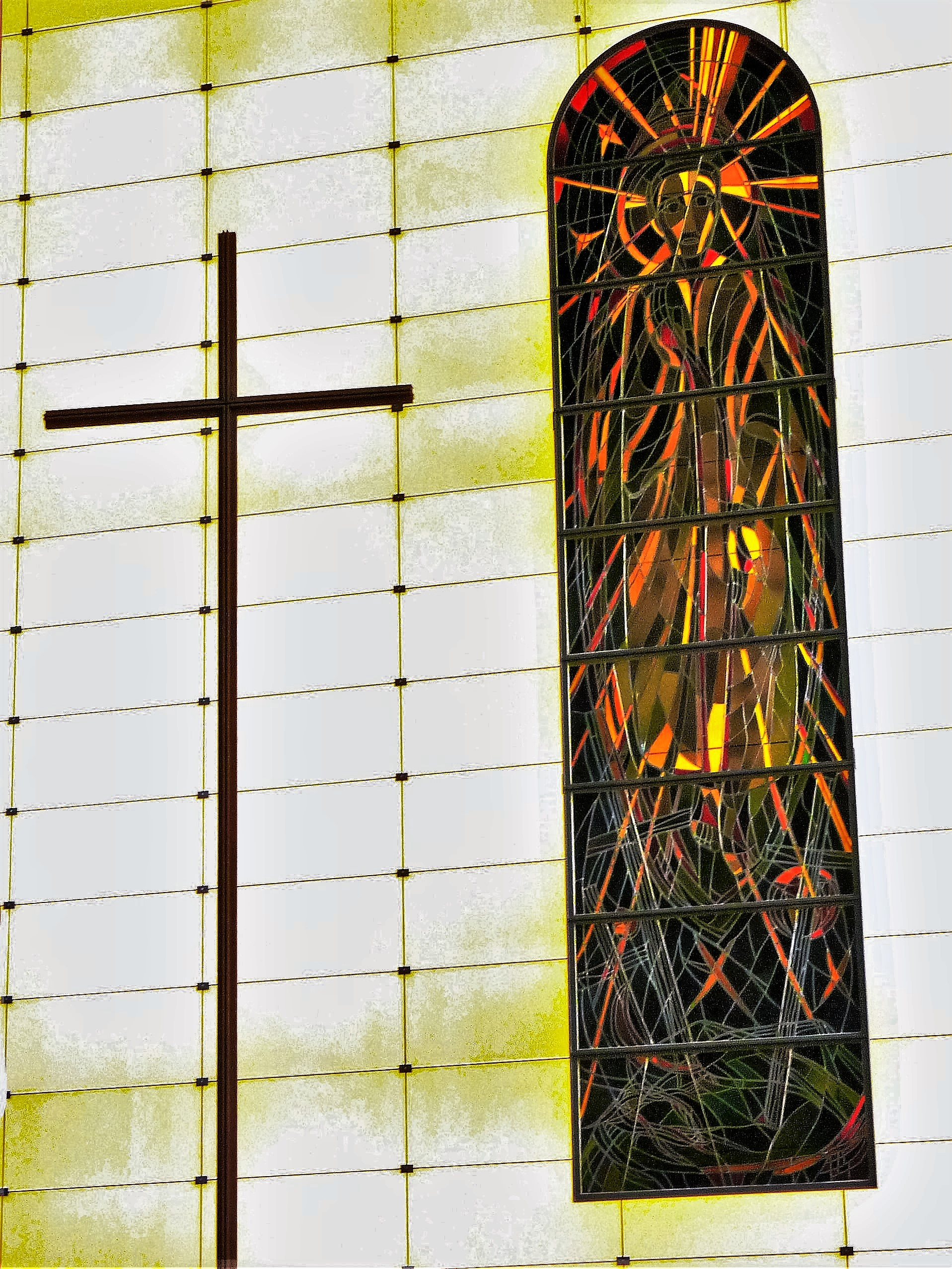 Auferstehungskirche Berlin-Friedrichshain. Chor- und Altarfenster der Künstlerin Frau Pape, März 1958. Beim Umbau der Kirche 2003 Umsetzung des Bildes in die Seitenwand.